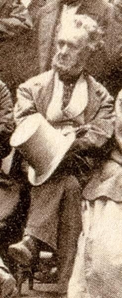 Howard Staunton (Ausschnitt einer historischen Fotographie)